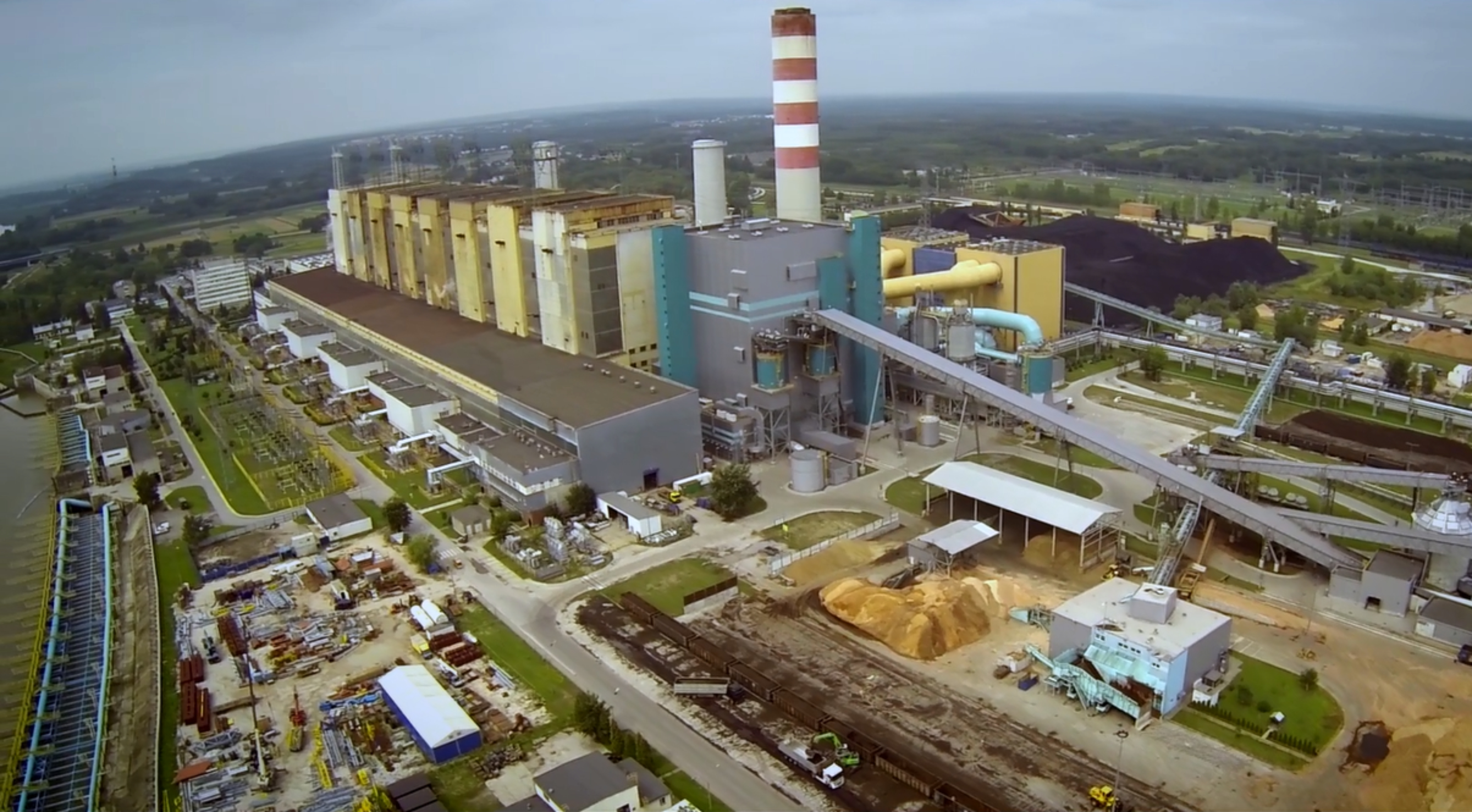 Widok Elektrowni Połaniec os strony Zielonego Bloku